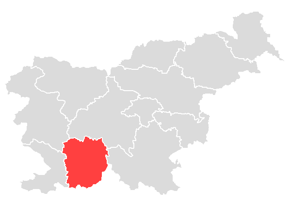 SURS